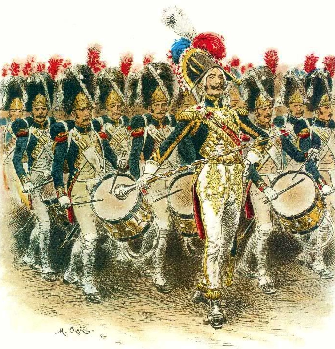 Fanfare des grenadiers à pied de la Garde impériale. Le tambour-major, avec sa longue canne à pommeau d'argent, est en tête.